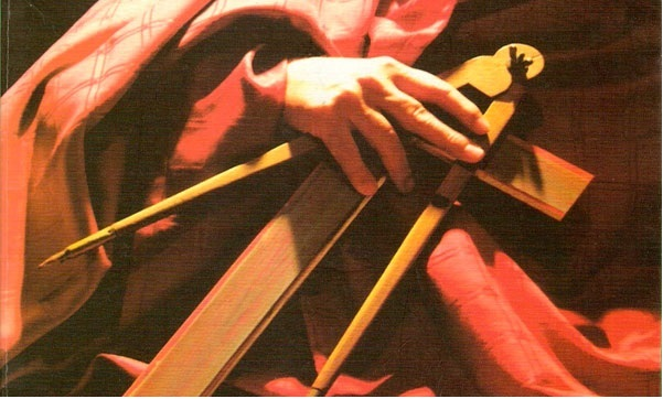 Escuadra y Compás